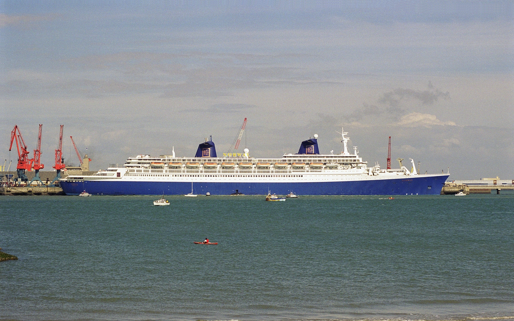 Le Norway vu depuis l'île de Ré, en escale au port de La Rochelle-Pallice le 31 juillet 1998. IMO Number: 5119143 MMSI Number: Call sign: Length: 316.00 m Beam: 33.80 m